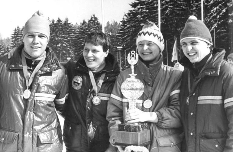 Jörg Hoffmann, Jochen Pietzsch, Cerstin Schmidt, Jens Müller ADN-ZB Schaar 8.3.1987-Bez. Suhl: DDR-Meisterschaften im Rennschlittensport in Oberhof-Alle DDR-Meister auf einen Blick. Das Weltmeister-Duo Jörg Hoffmann (l.) und Jochen Pietzsch (2.v.l.) vom ASK Oberhof siegte in der Doppelkonkurrenz und kam bereits zum fünften Mal in Folge zu Titelehren. Weltmeisterin und Weltcupsiegerin Cerstin Schmidt vom SC Traktor Oberwiesenthal (2.v.r.) und der WM-Zweite Jens Müller (ASK Oberhof-r.) entschieden die Einerwettbewerbe souverän zu ihren Gunsten.